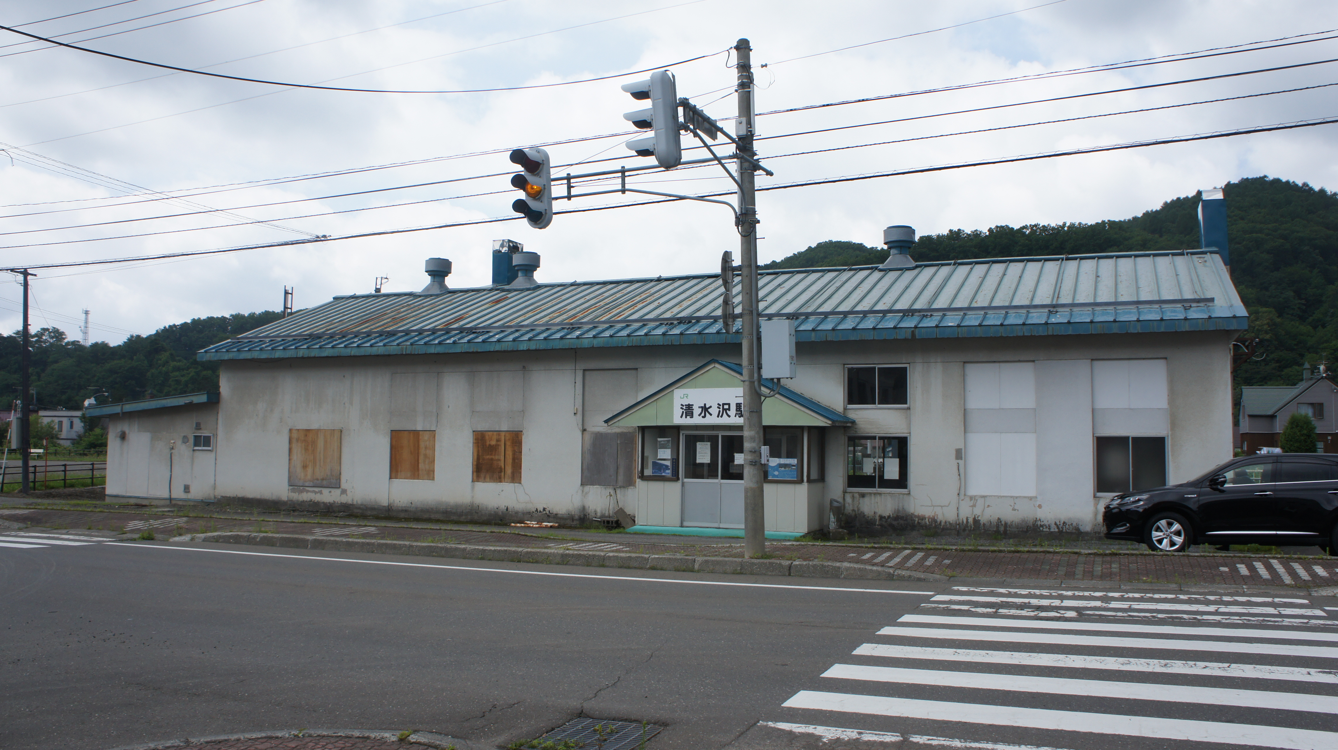 JR石勝線・清水沢駅の駅舎